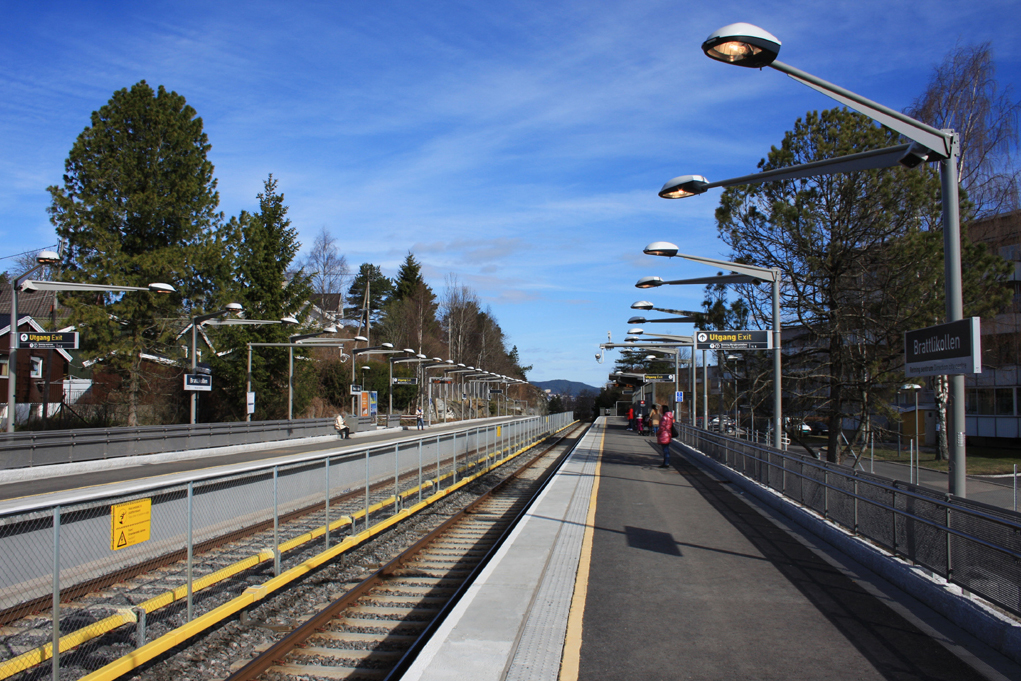 Brattlikollen T-banestasjon i 2014 utgave fra Spor 2 mot Ryen.